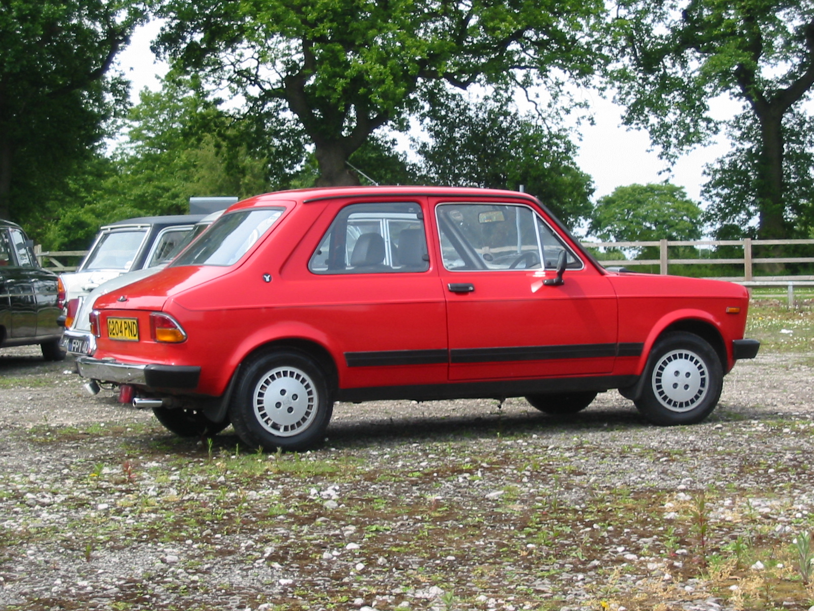 Zastava_Yugo_311_(side view).